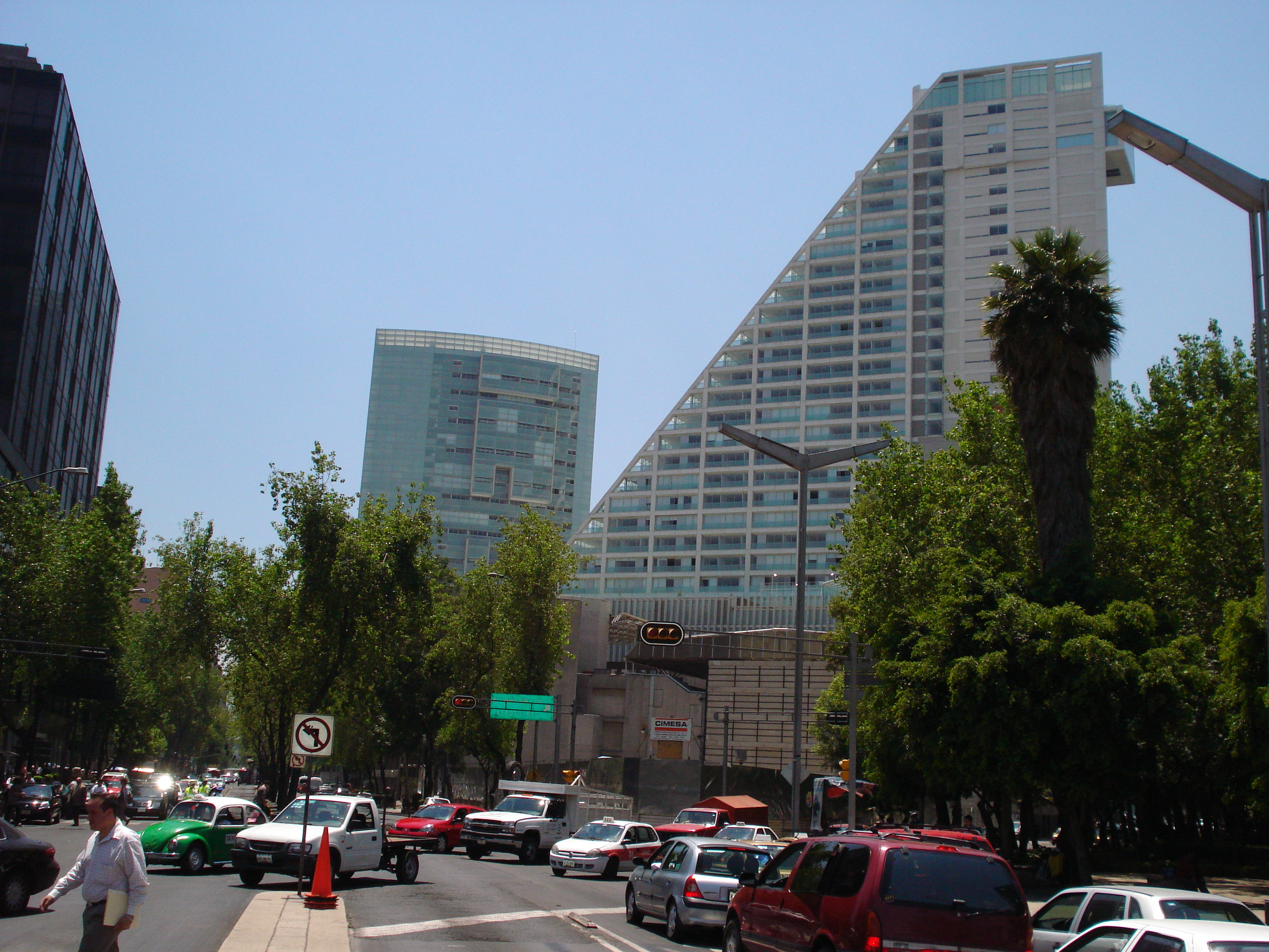 Torre Punta Reforma (cimentación).